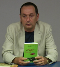 Eugen Ovidiu Chirovici-lansarea cărții Suflete la preț redus, la Biblioteca Județeană "Petre Dulfu" Baia Mare